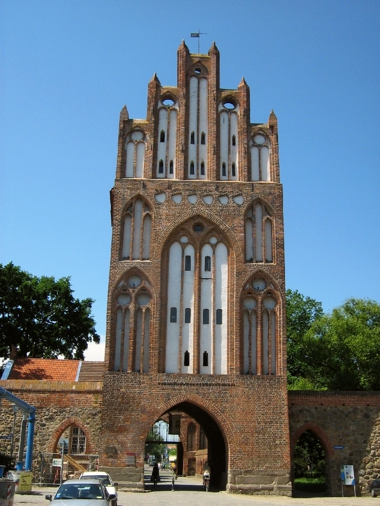 Das Treptower Tor (Haupttor, Stadtseite) in Neubrandenburg (Mecklenburg). Das Treptower Tor ist das prächtigste Tor der norddeutschen Backsteingotik und beherbergt seit über 100 Jahren ein Museum.